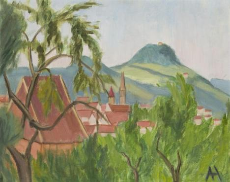 Alice Haarburger: Ansicht von Reutlingen (1930)Exponat der Sonderausstellung im Reutlinger Heimatmuseum Reutlingen - gemalt und gezeichnet: Ausgewählte Ansichten, vom 3. April bis 14. August 2011